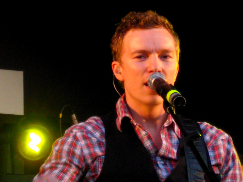 Brinck